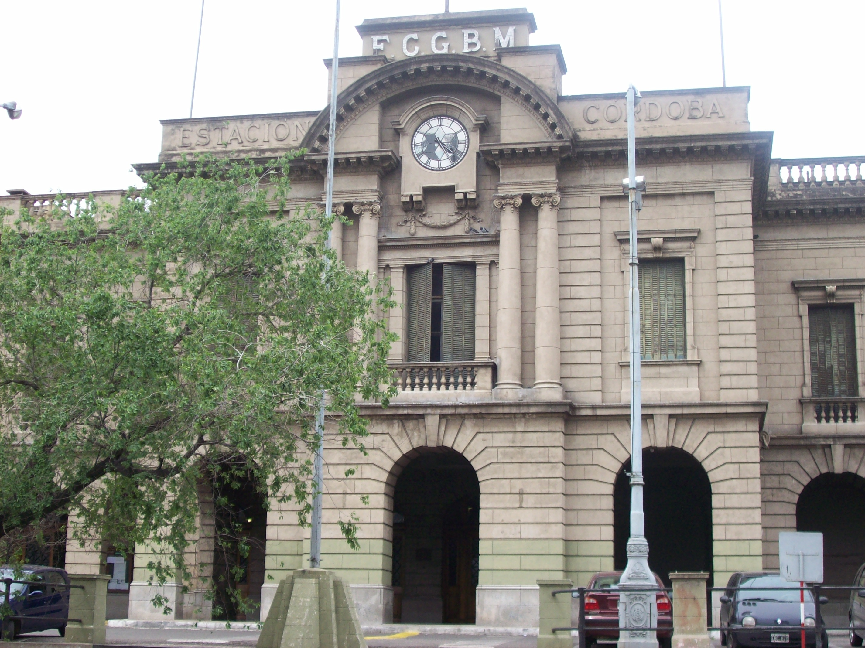 Entrada de la Estación Córdoba del FCGBM, en la provincia de Córdoba, Argentina.